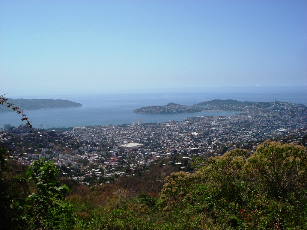 Vista de la Bahía de Acapulco en la parte más alta de la zona arqueológica de Palma Sola en Acapulco, Guerrero, México.